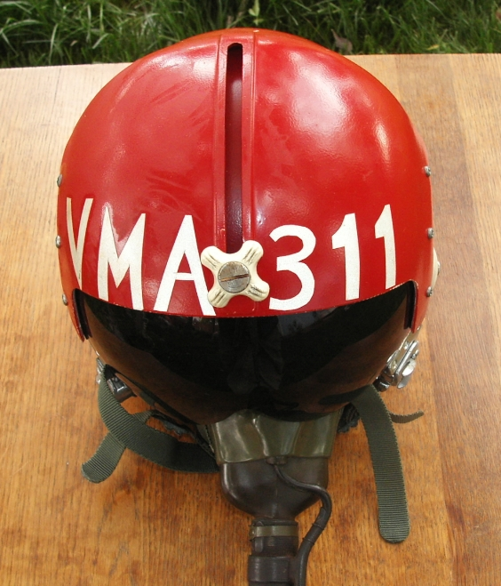 Vietnam War Era - Marine Squadron VMA-311 - Flight Helmet